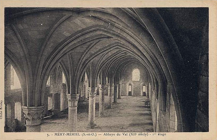 Abbaye Notre-Dame du Val, le dortoir des moines, Mériel (Val-d'Oise), France.